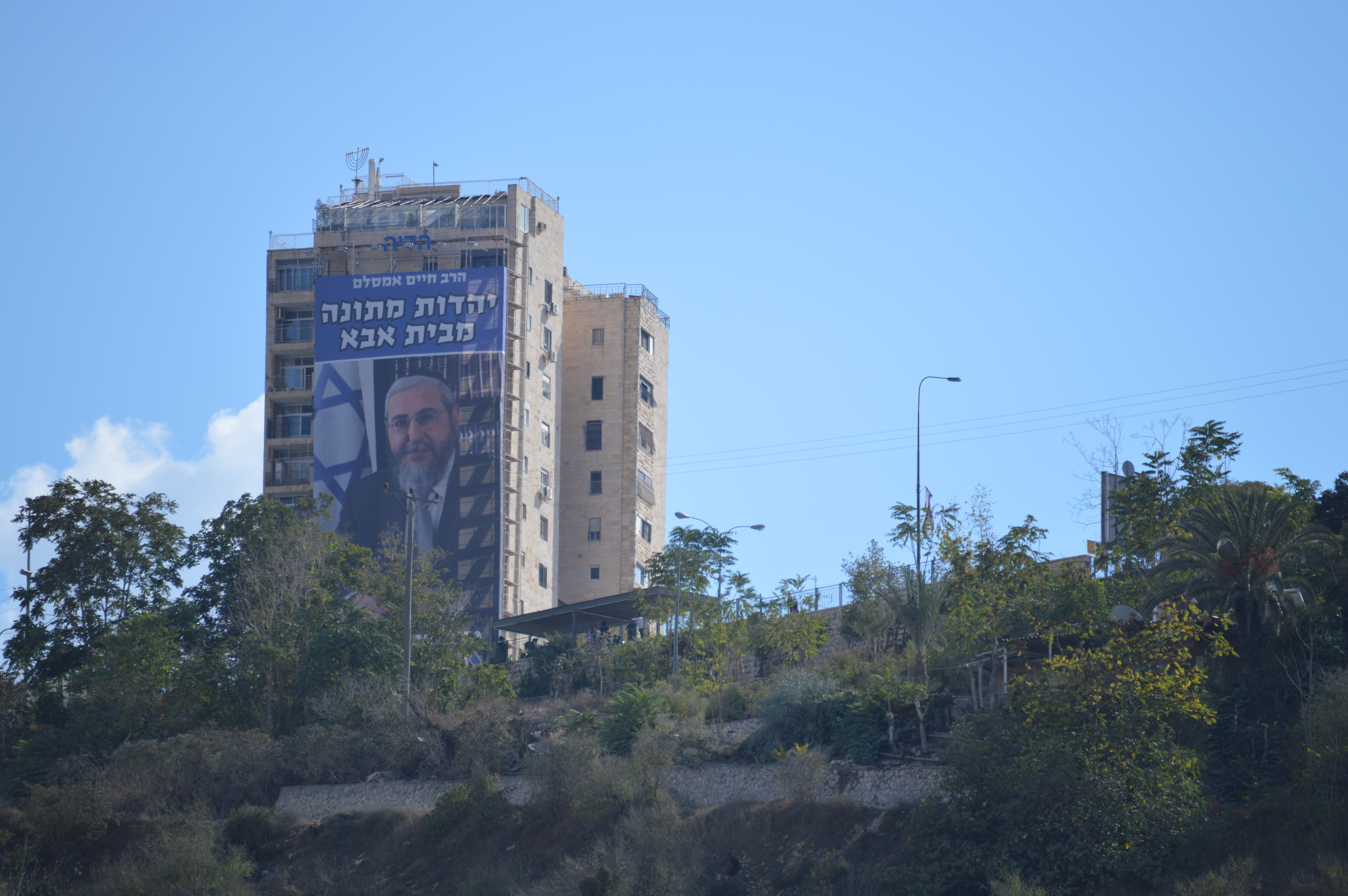 כרזה של הרב אמסלם על בניין בכניסה לירושלים